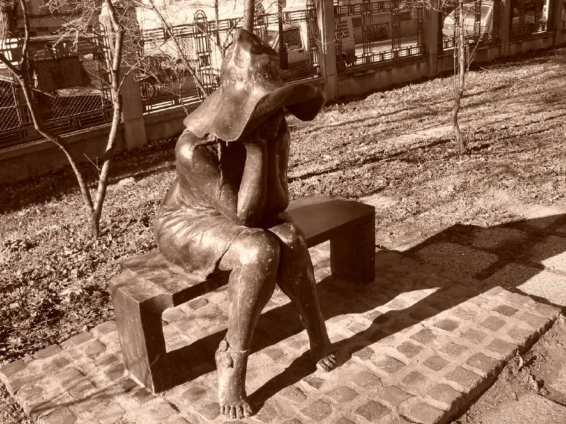 A kalap alatt című bronz szobor a Szeged, Korányi fasoron áll. A csinos szobor majdnem két évtizedet várt, hogy végleges helyére kerüljön. A klinikáktól a Belvárosi hídig kialakuló szoborsétány első zsáner szobra. Lapis Andrásnak a főiskola elvégzése után az első köztérre szánt alkotása. A Tiszával szemben elhelyezett, térdére könyöklő ülő figura arcát nagy kalap takarja. Innen a találó címe